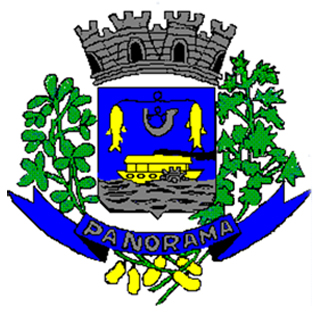 Brasão De Armas Da Cidade De Panorama-SP